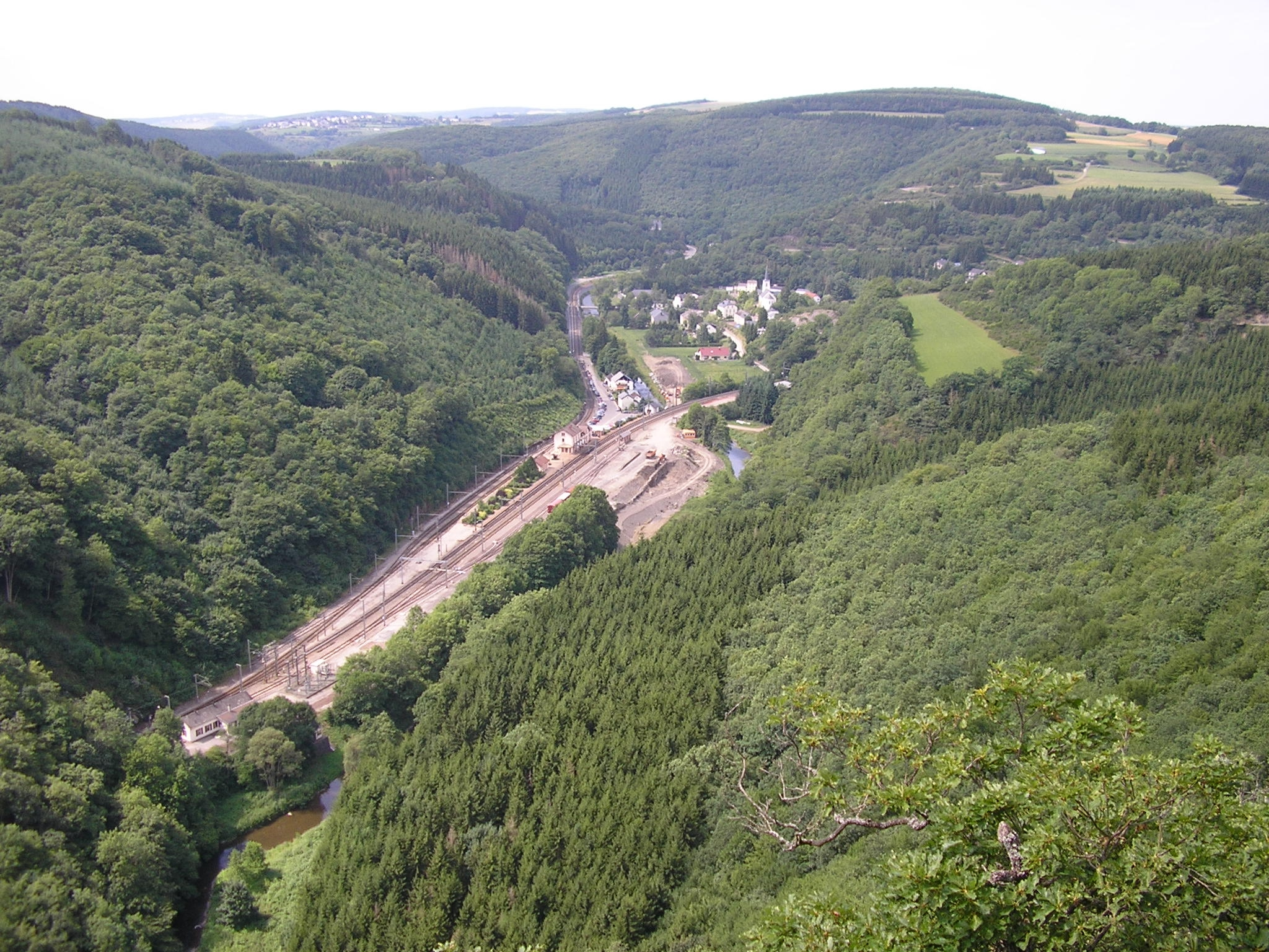 Blick von der Hockslee auf Kautenbach, Gemeinde Kiischpelt, Luxemburg